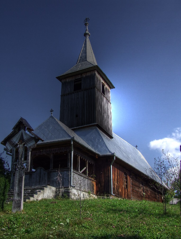 Biserica de lemn din Urişiu de Sus, judeţul Mureş. Vedere de ansamblu din sud-vest.